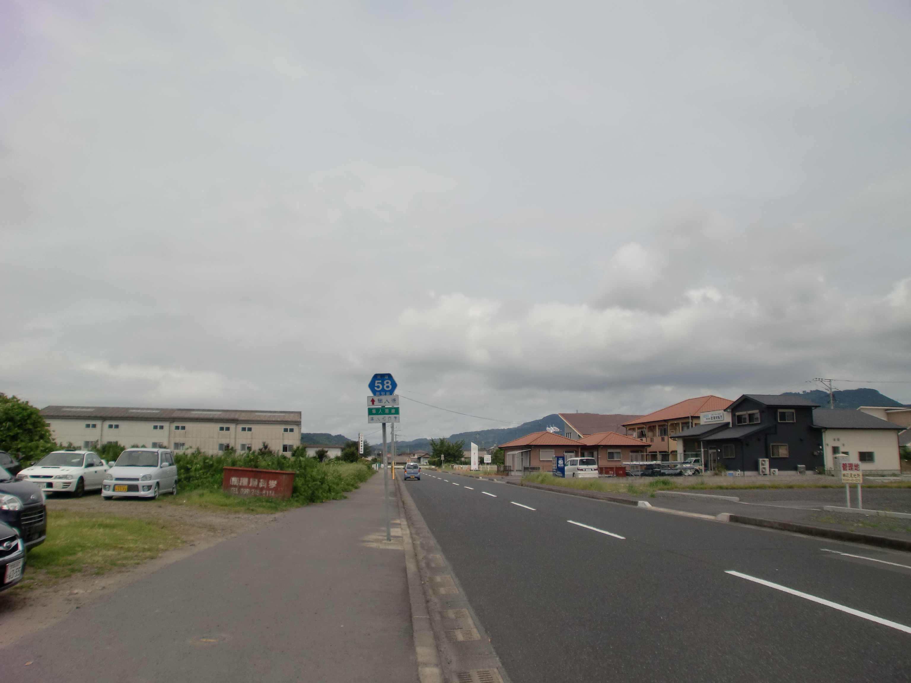 鹿児島県道58号隼人港線を隼人東インターチェンジから隼人港方面を望む